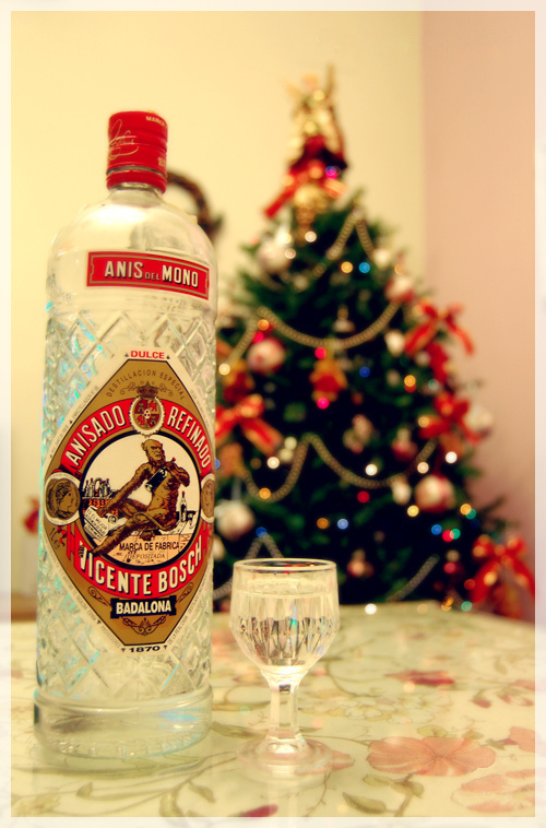 Una botella de anís del mono. Al fondo, un árbol de navidad.